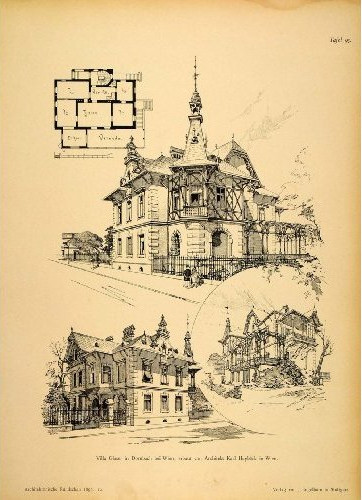 Entwurf für die Villa Glaser in Dornbacher Straße 62 von Karl Haybäck aus dem Jahr 1896; Ausführung durch Heinich und Franz Glaser